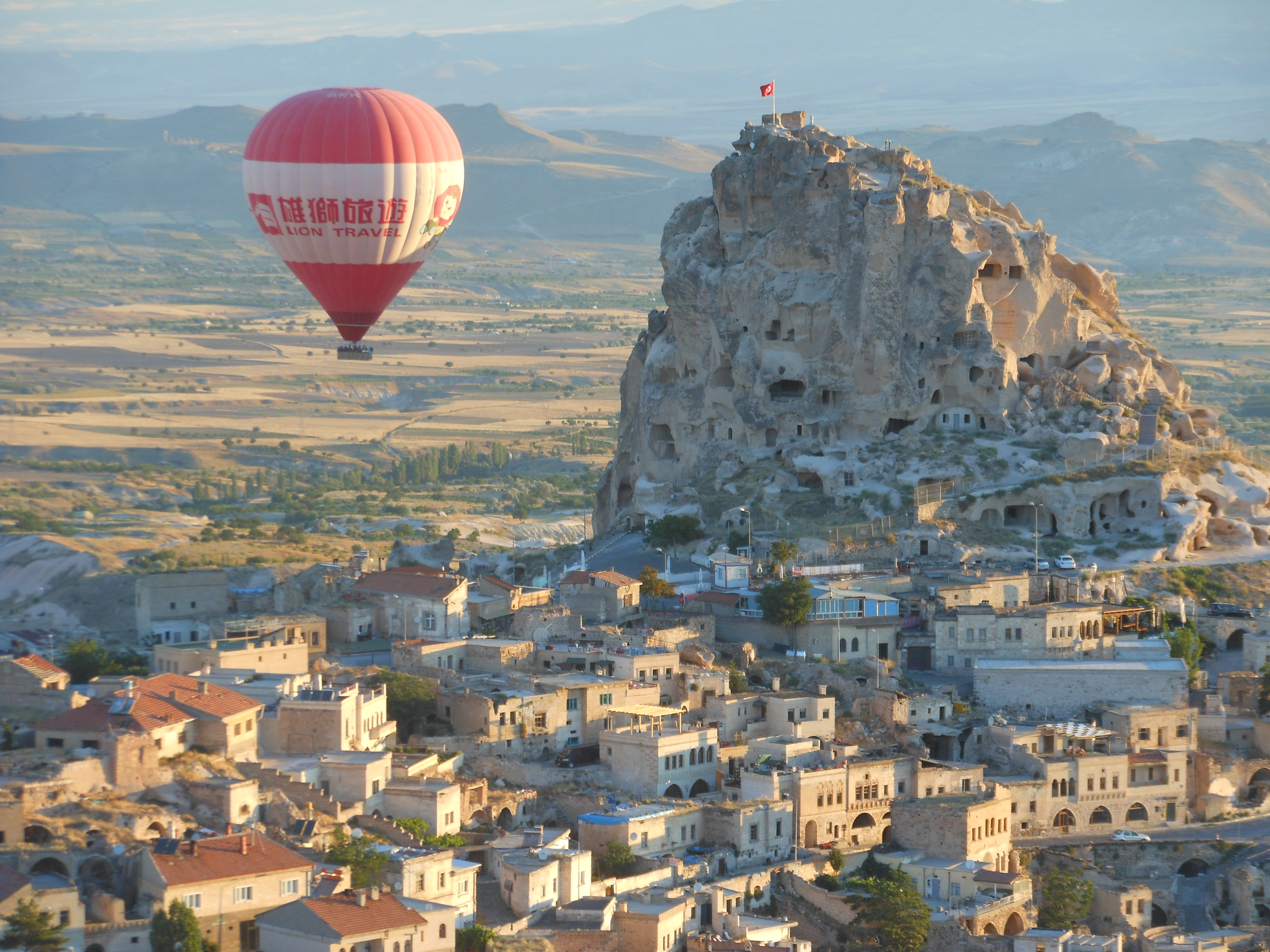 Viaje en Globo Capadocia, Turquia.